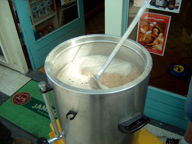 Maischen door amateur